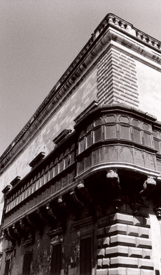 La Valletta, Malta, l'esterno del Palazzo del Grande Maestro. Foto scattata da Stefano Trezzi e rilasciata sotto Creative Commons.